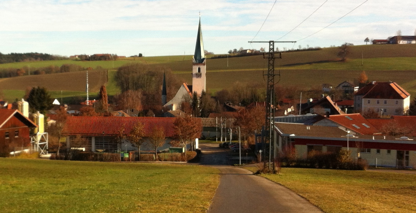 Blick von Westen auf Sankt Wolfgang (mit Pfarrkirche und Rathaus (rechts)